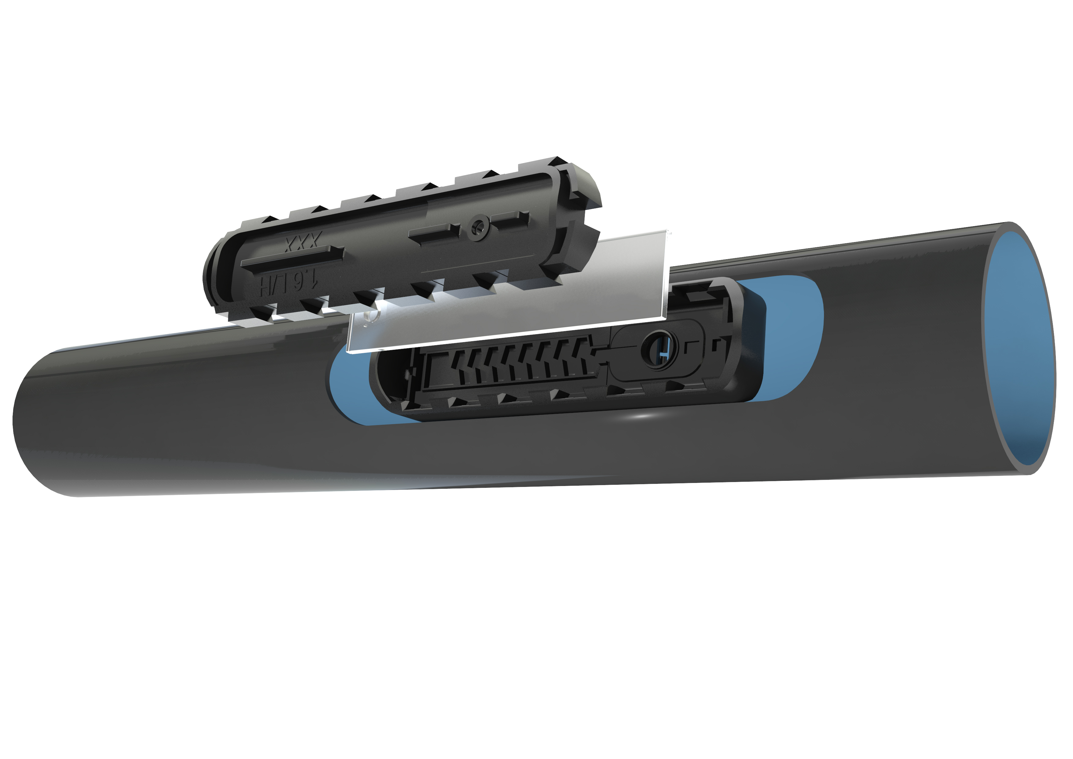 טפטפת יונירעם